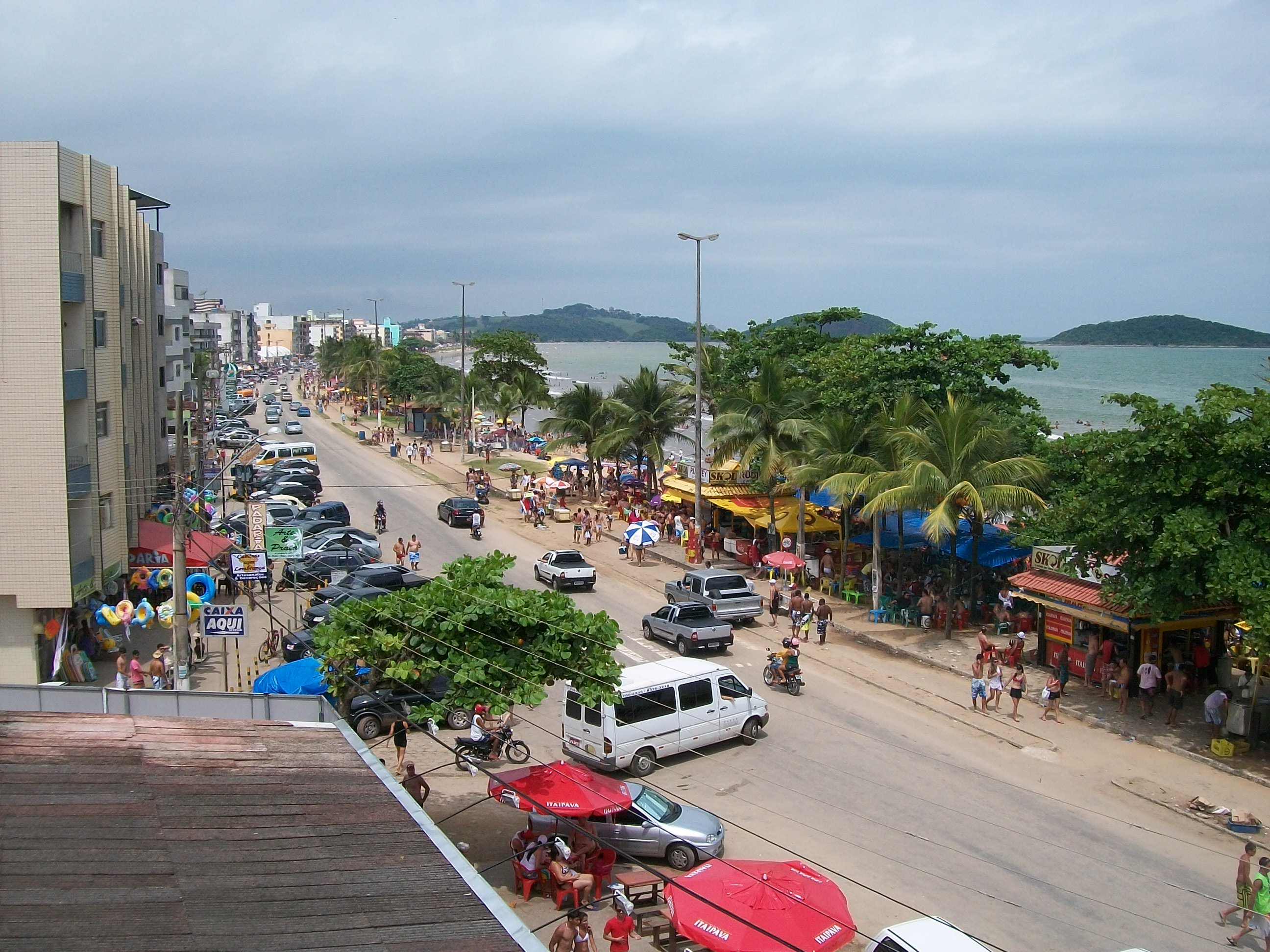 Piuma - ES